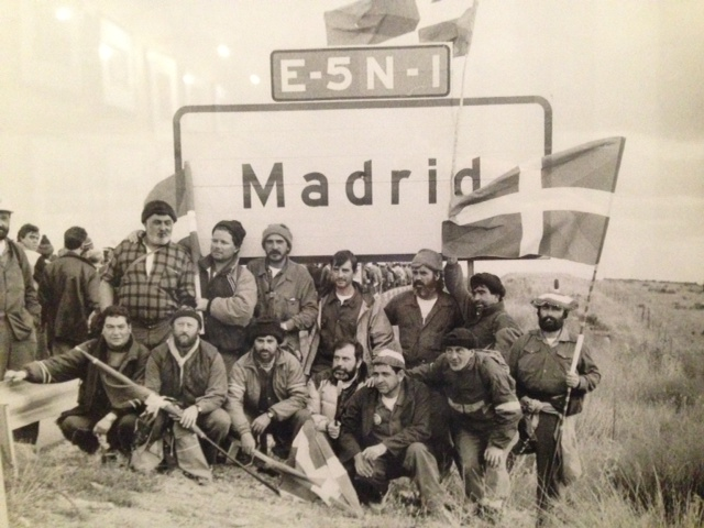 Burdinaren martxaren irudia, Madrilera iristerakoan